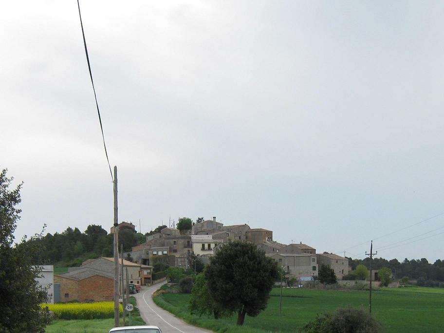 La Rabassa (Sant Guim de Freixenet)